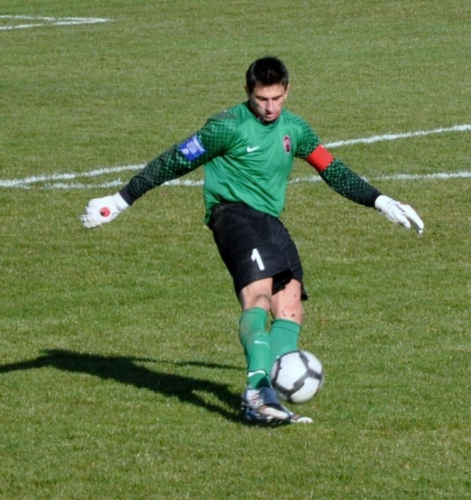 Юрий Мартыщук — украинский футболист.